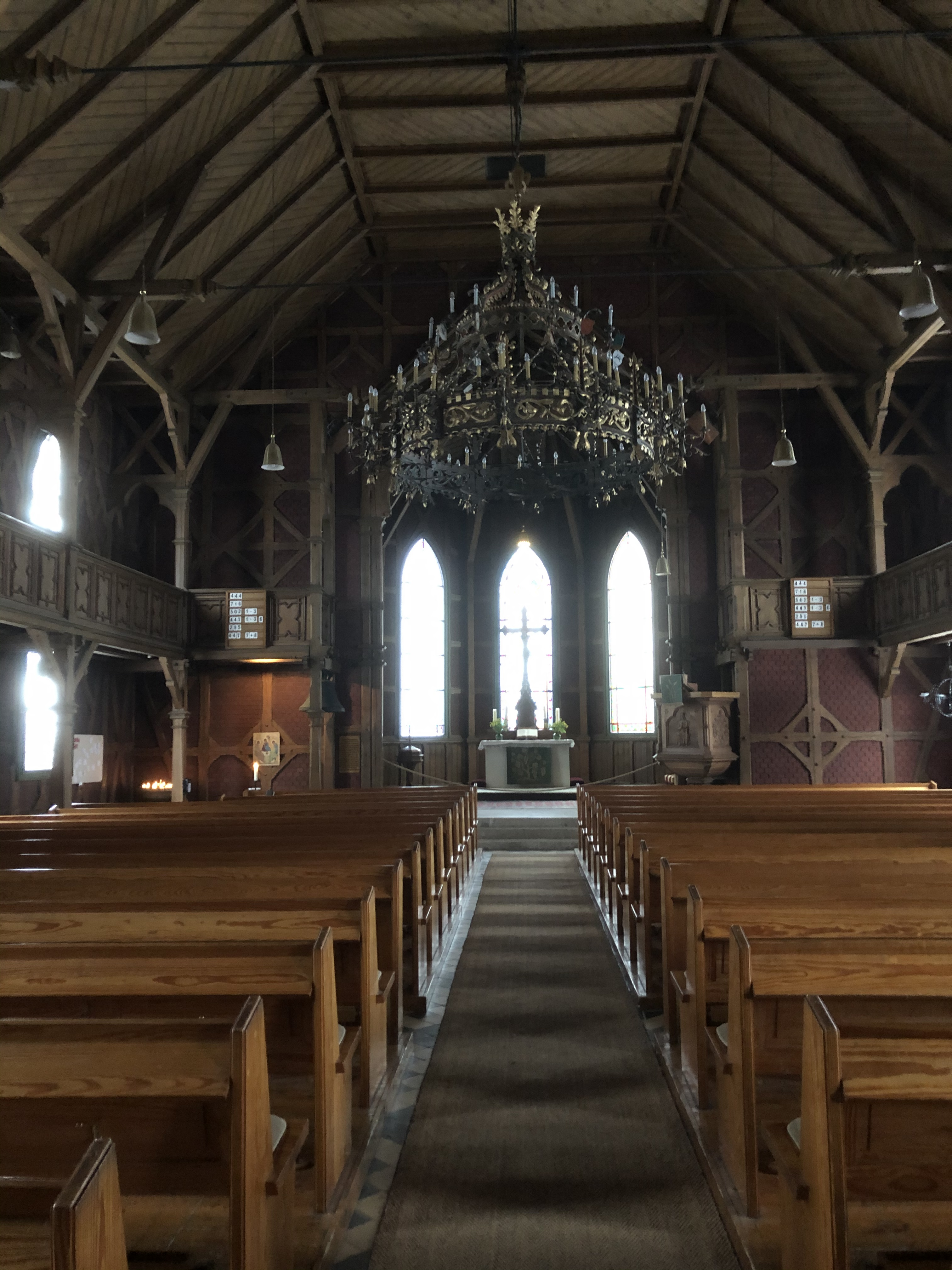 Kirchenschiff Trinitatiskirche Braunlage